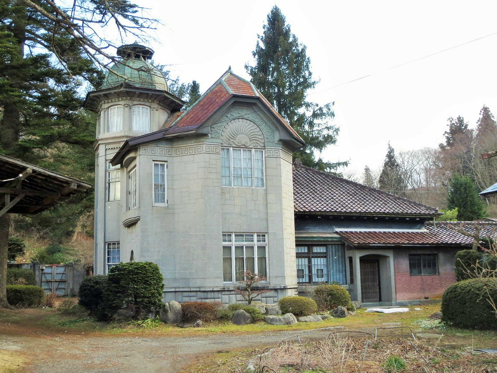 三戸市にある佐瀧別邸 Canon IXY 3